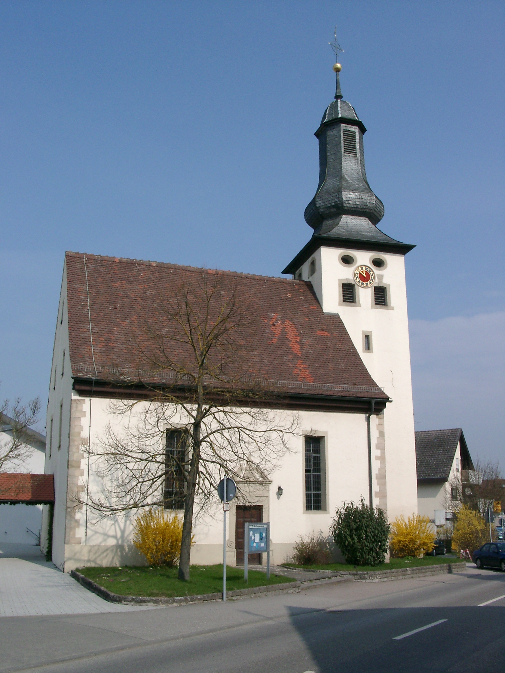 Bretzfeld, Evangelische Kirche